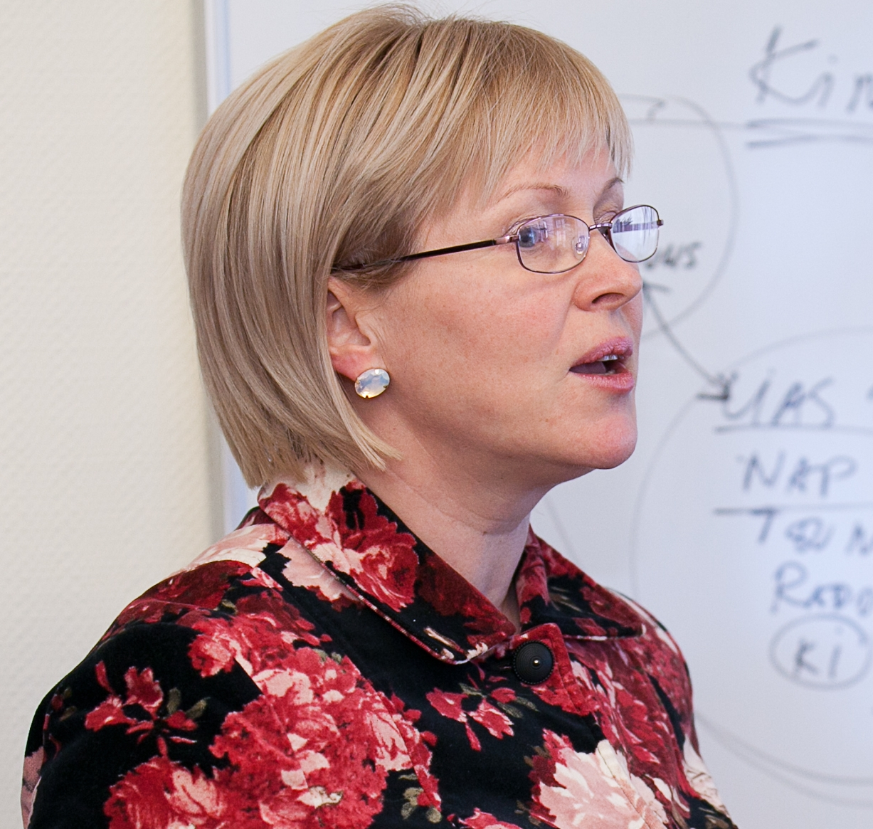 Žaneta Jaunzeme-Grende